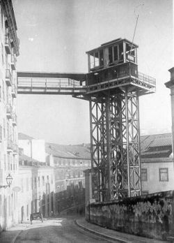 Foto do alto da Cç de São Francisco, mostrando o Elevador da Biblioteca (Lisboa).